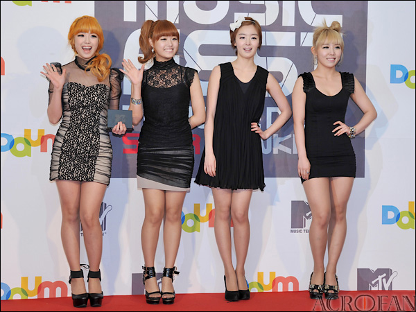 2AM. 2011년 2월, MTV-DAUM 뮤직 페스트에서.